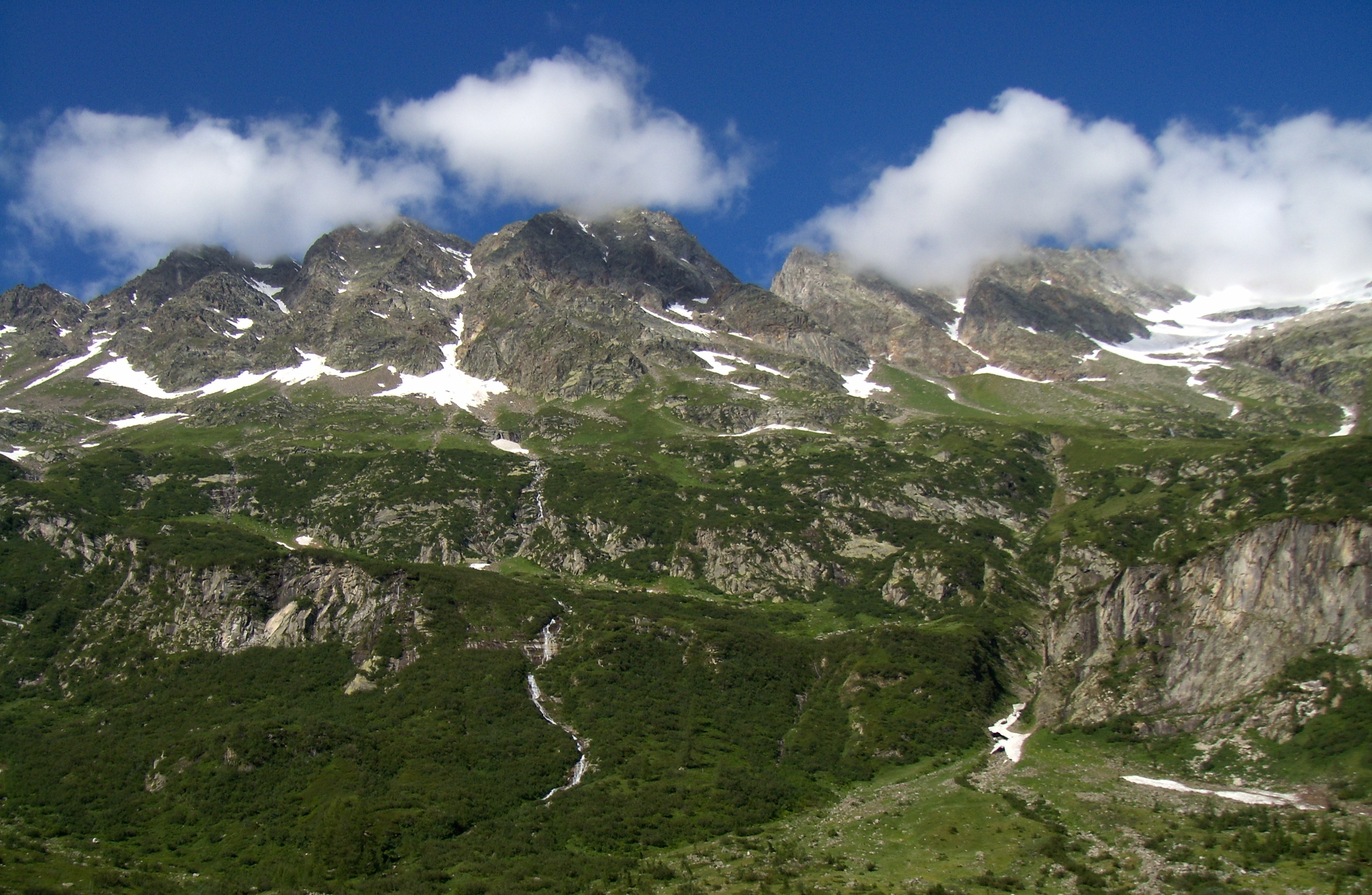 Alte Valli Anzasca, Antrona e Bognanco (Q47087434)